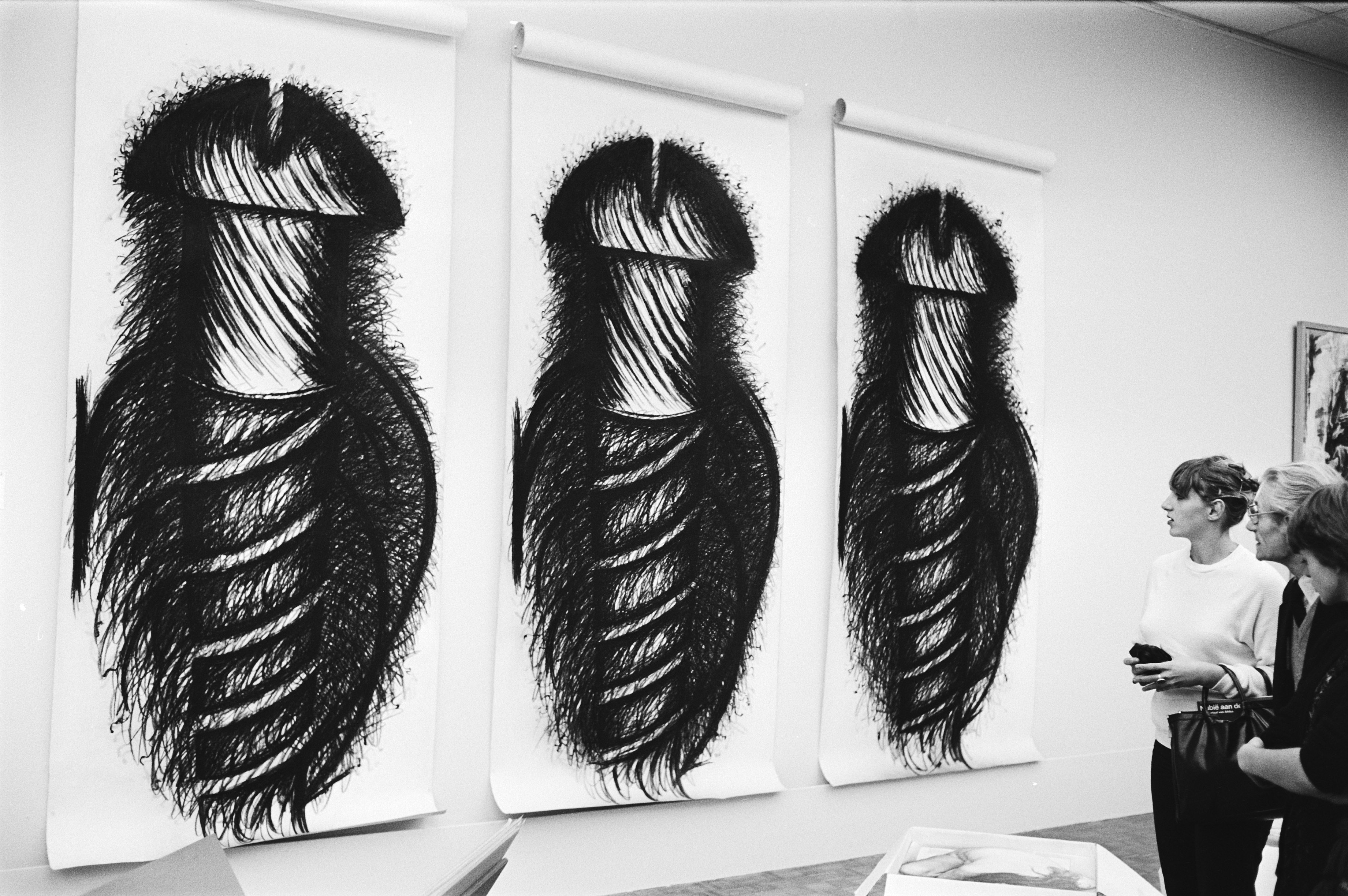 Collectie / Archief : Fotocollectie Anefo Reportage / Serie : Tentoonstelling "Feministische kunst, internationaal" in Haags Gemeentemuseum Beschrijving : Werk genaamd "De Phallusschroef" van Judith Bernstein Datum : 14 november 1979 Locatie : Den Haag, Zuid-Holland Trefwoorden : feminisme, kunst, tentoonstellingen Persoonsnaam : Bernstein, Judith Fotograaf : Suyk, Koen / Anefo Auteursrechthebbende : Nationaal Archief Materiaalsoort : Negatief (zwart/wit) Nummer archiefinventaris : bekijk toegang 2.24.01.05 Bestanddeelnummer : 930-5395